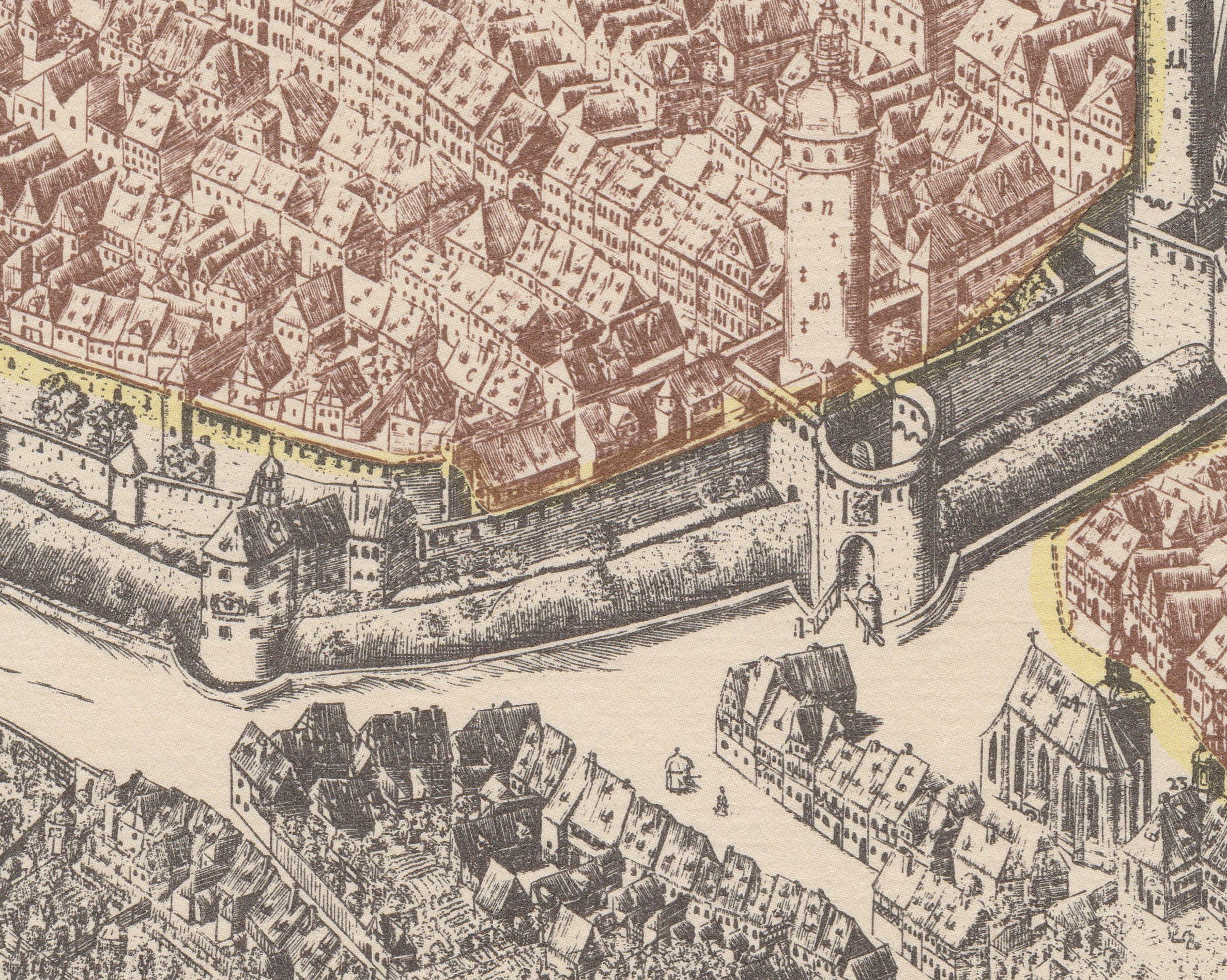 Plan von Bautzen im Jahr 1709. Rot gekennzeichnet die vom Brand am 22. April 1709 zerstörten Teile der Stadt. Hornjoserbsce: Plan Budyšina z lěta 1709. Čerwjene su přez woheń dnja 22. apryla 1709 zničene měšćanske dźěle.